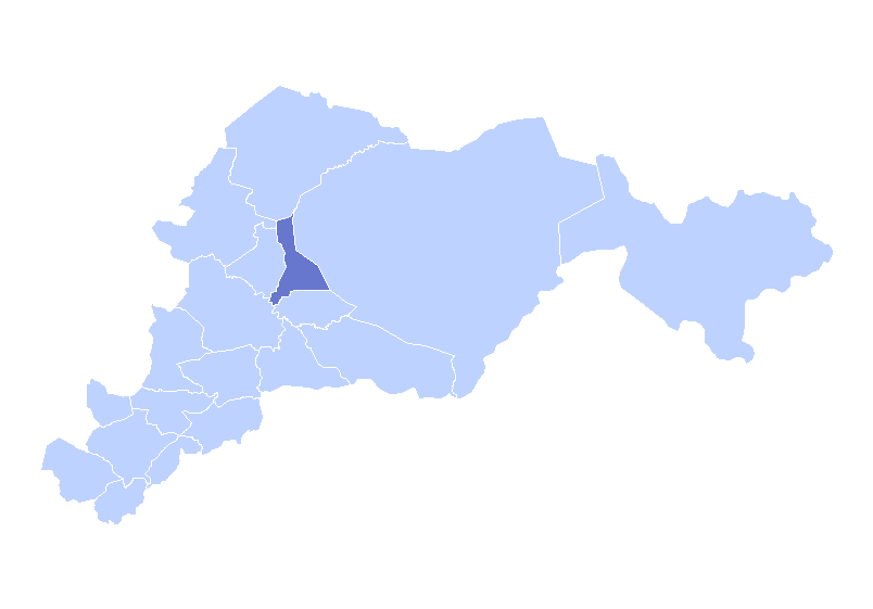 Położenie gminy Jacaleapa na mapie departamentu El Paraiso